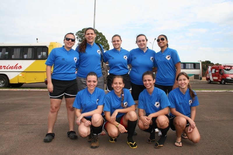 hawks maringa rugby